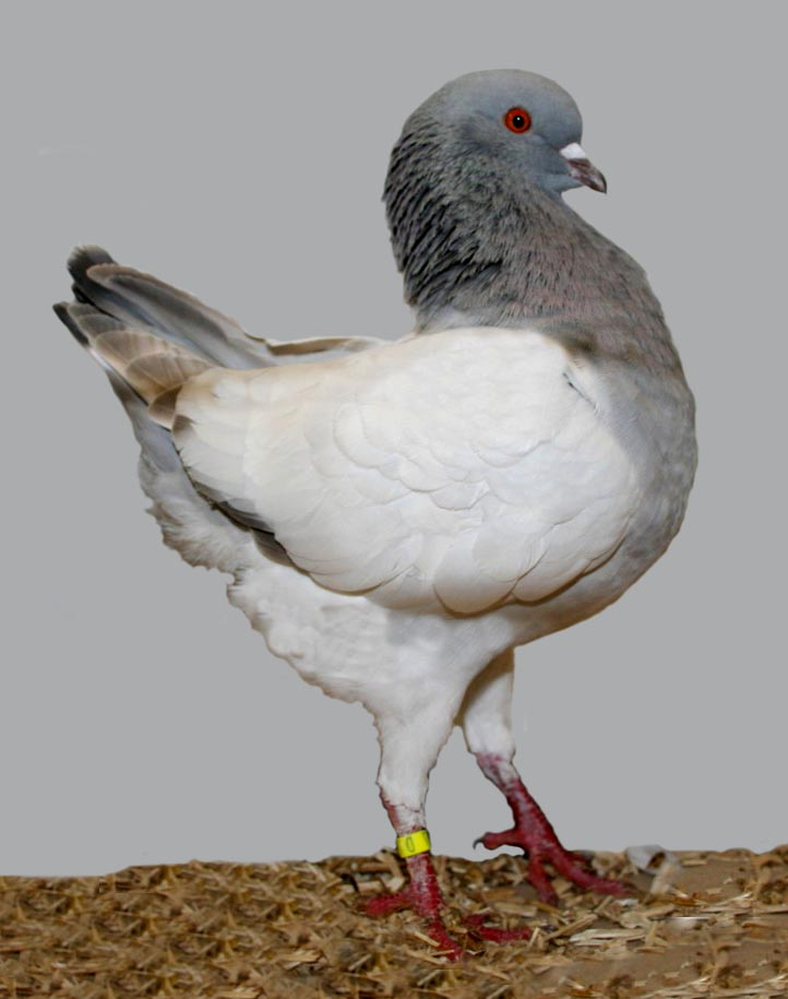 Modena, German (Barless Silver)